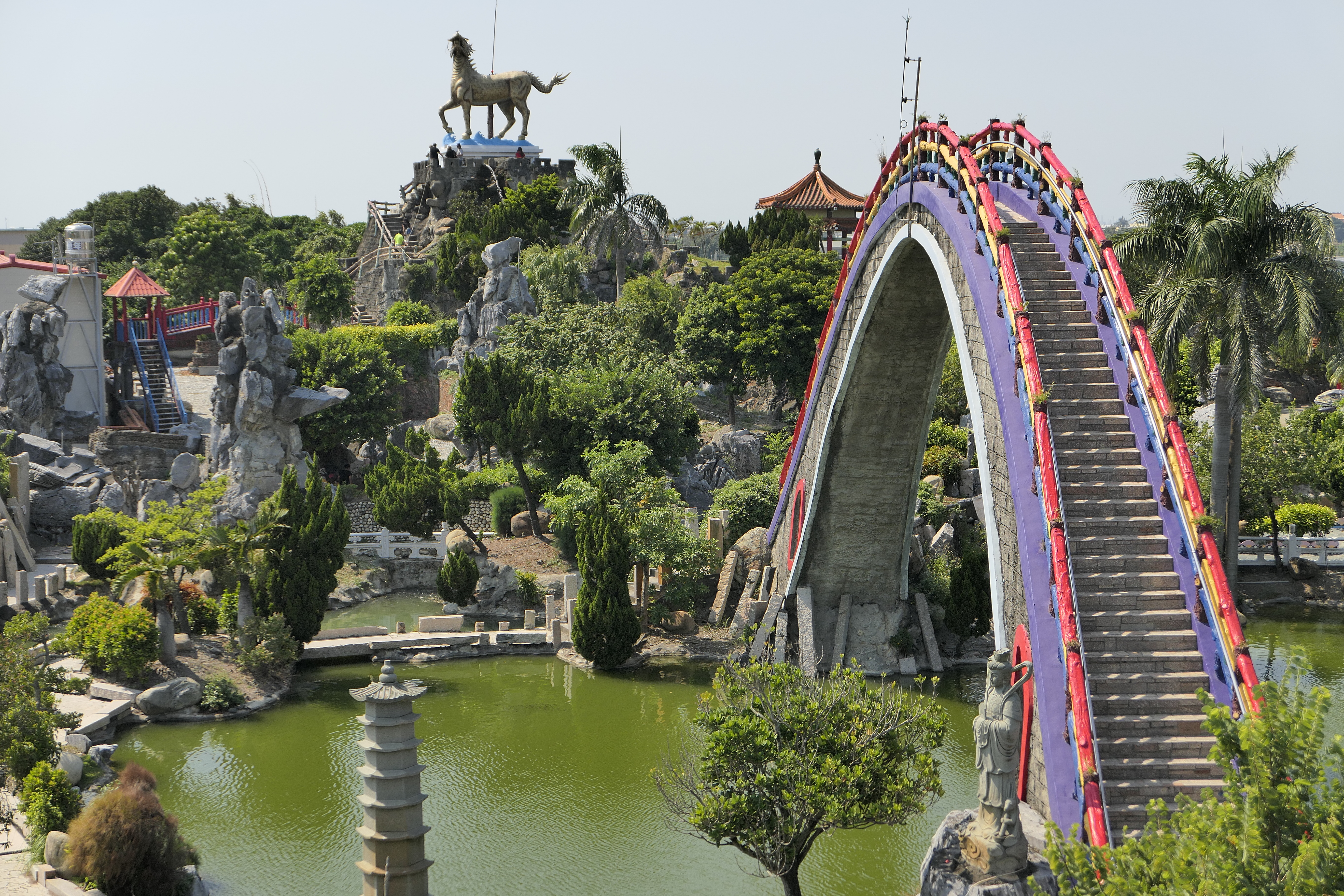 中文（台灣）: 五年千歲公園